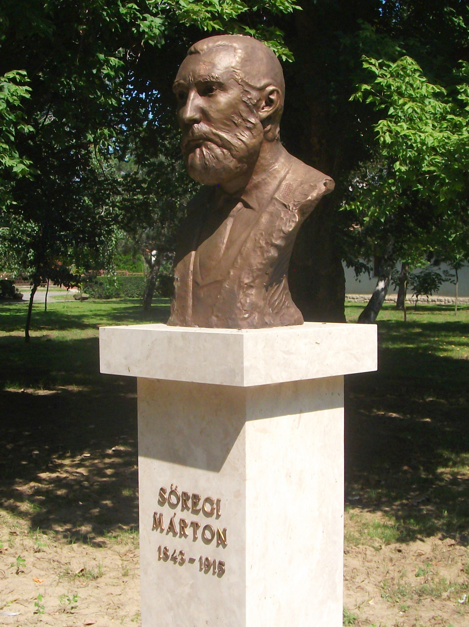 Sőregi Márton bronz mellszobra Cigándon, a Hősök terén. A szobrot 2015. augusztus 20-án avatták fel, amely Czigándi Varga Sándor alkotása.